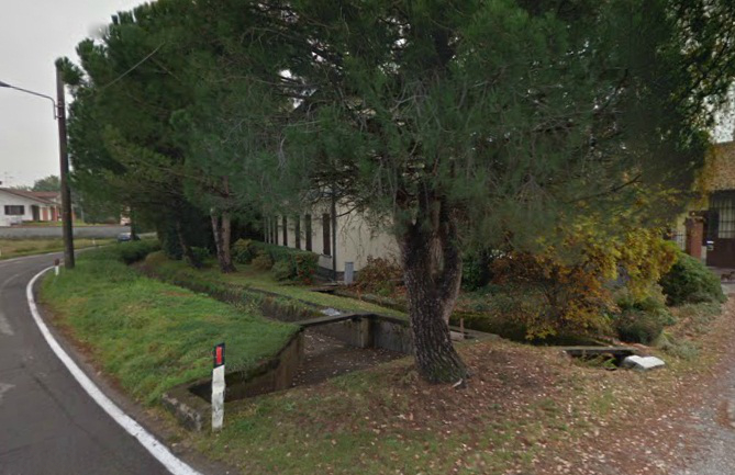 Opere di canalizzazione ad opera del Consorzio Villoresi presso la frazione di Castellazzo de' Stampi a Corbetta (MI) - Italy